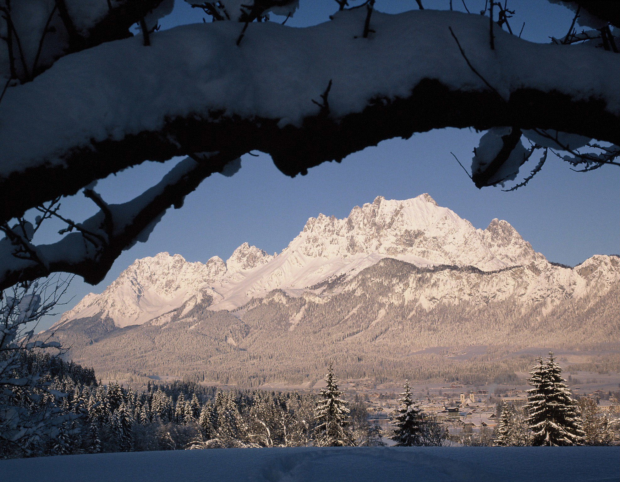 Winter Kaiser St. Johann in Tirol